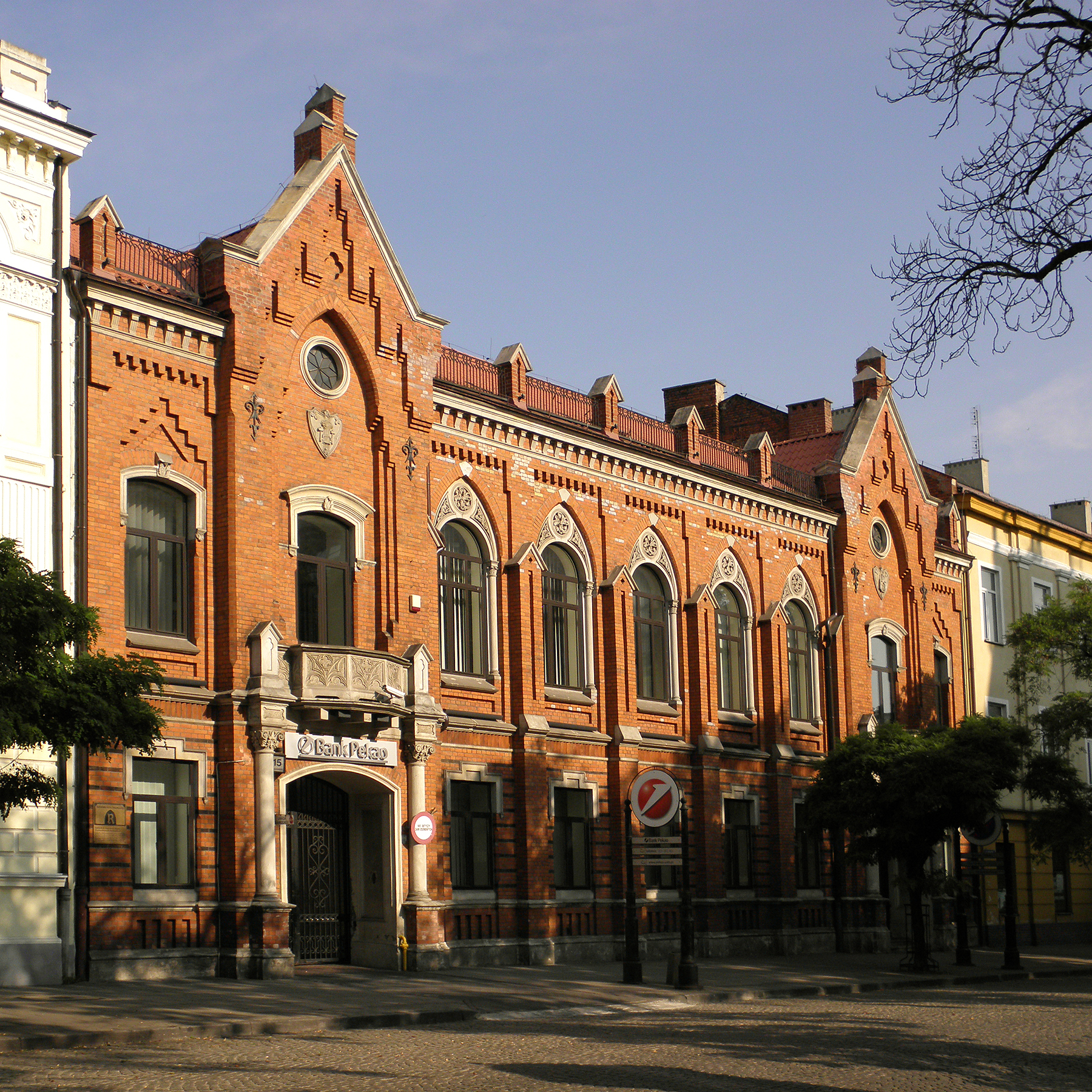 Radom - budynek dawnej Kasy Przemysłowców Radomskich.